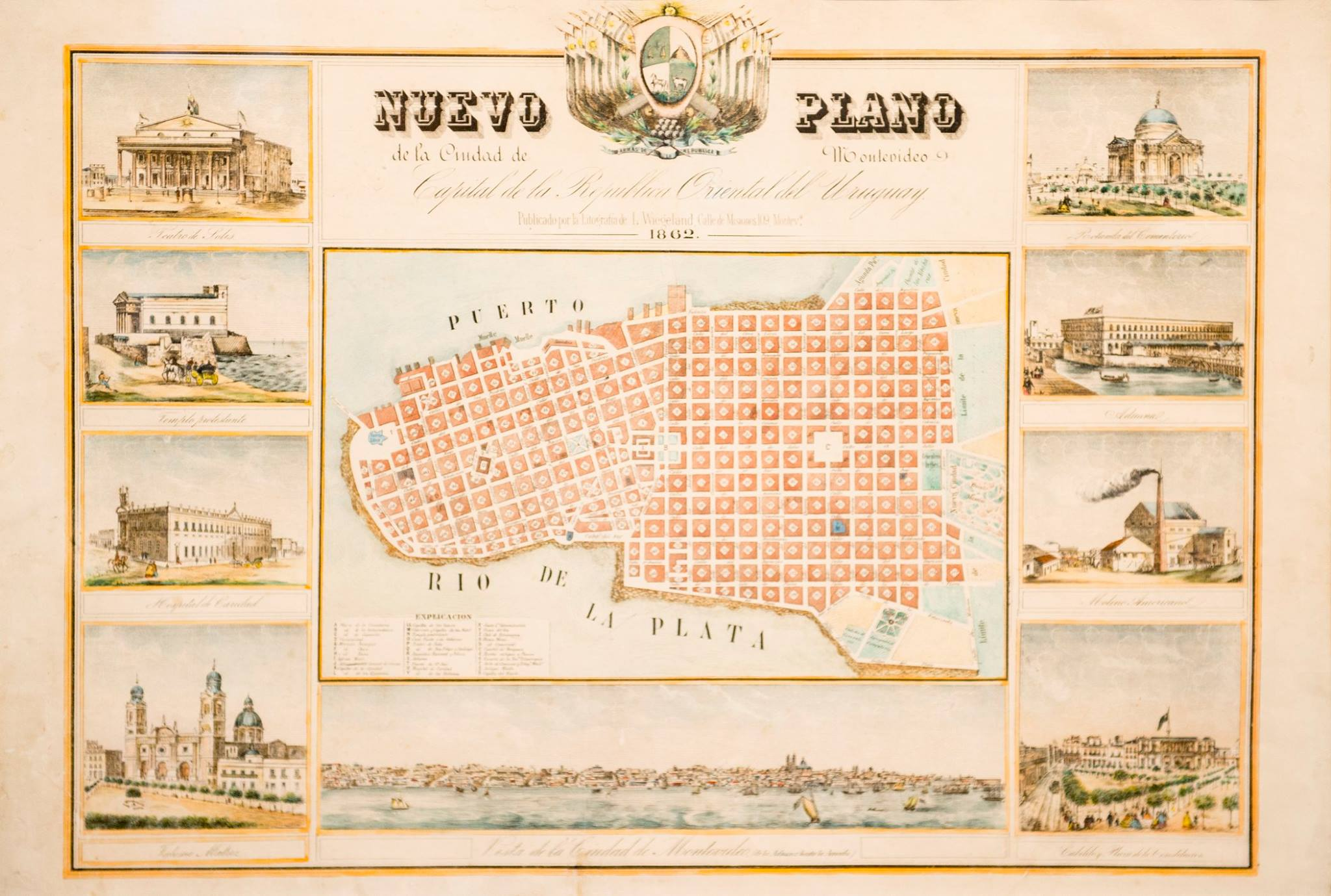 "Nuevo plano de Montevideo" de 1862 tomado en el Cabildo de Montevideo